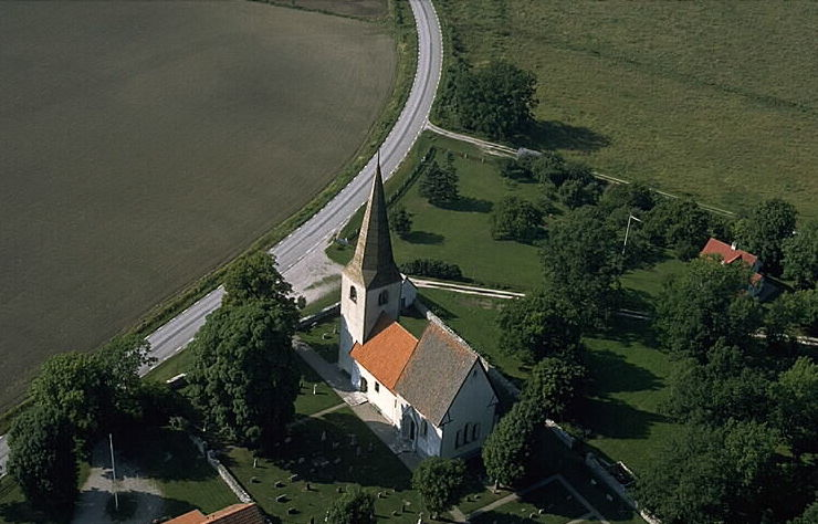 Motiv: Lummelunda kyrka Nyckelord: Flygbilder, Riksintressen Kategori: KyrkomiljöLummelunda kyrka